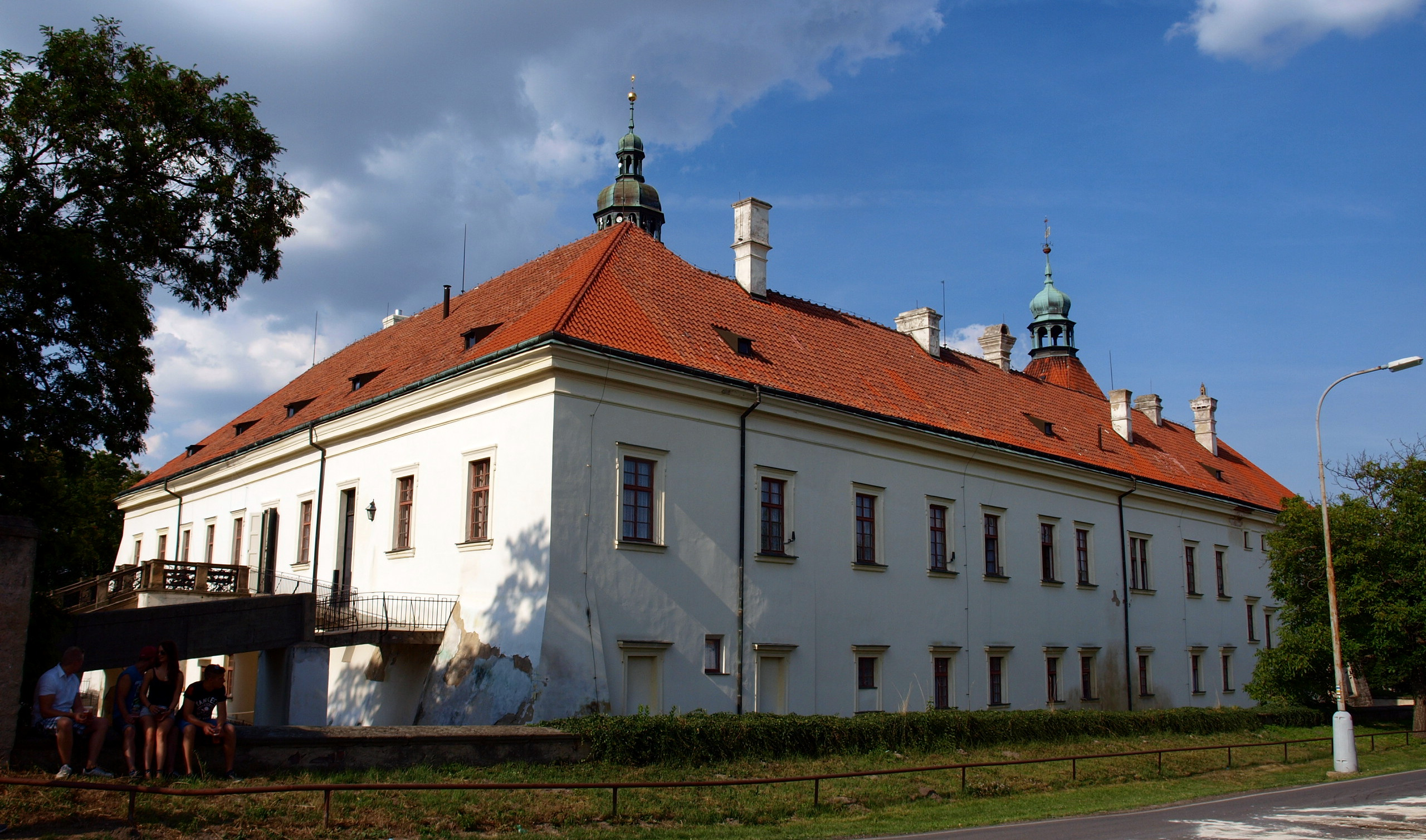 Zámek Smečno